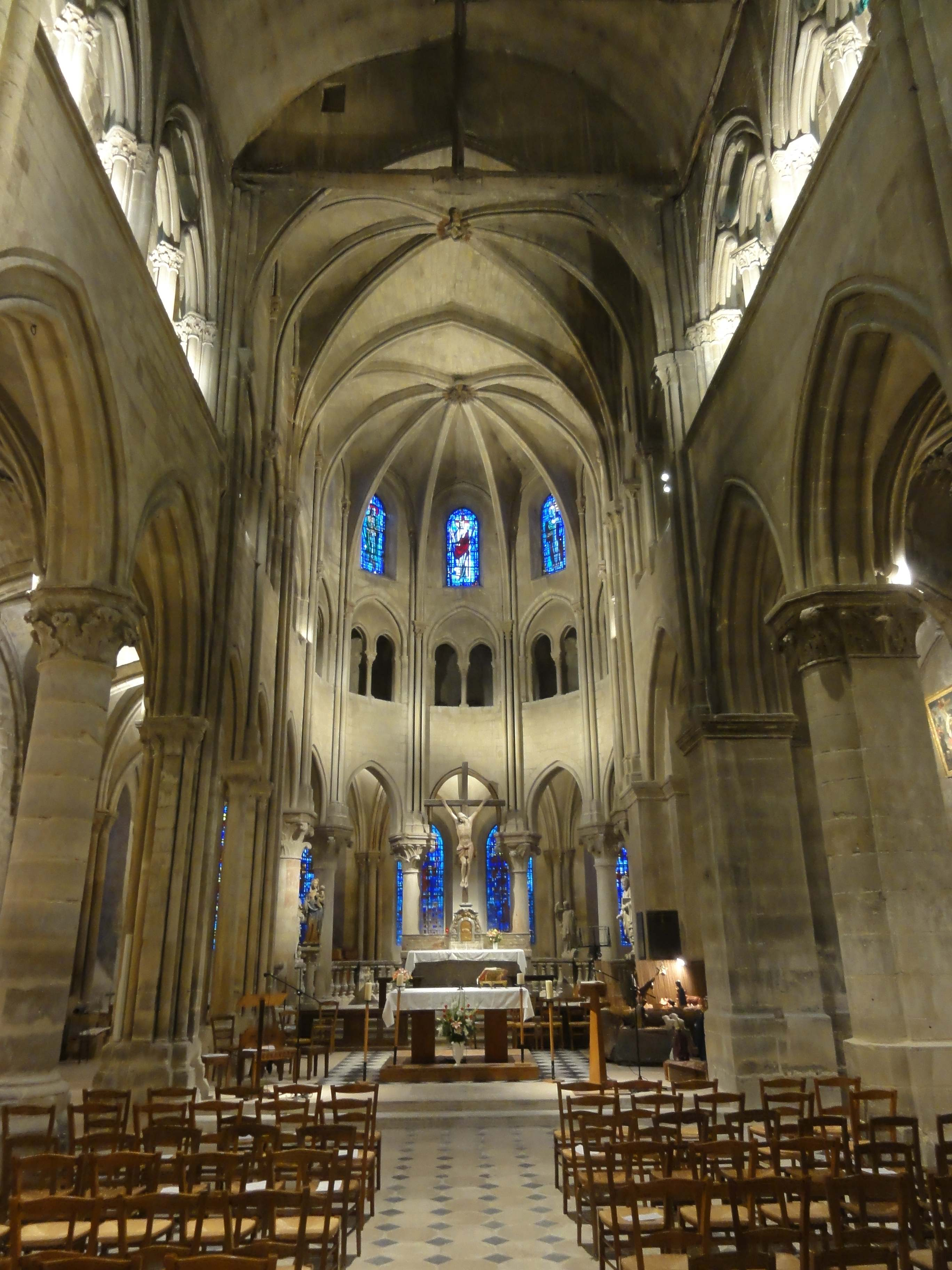 Nef, vue vers l'est.